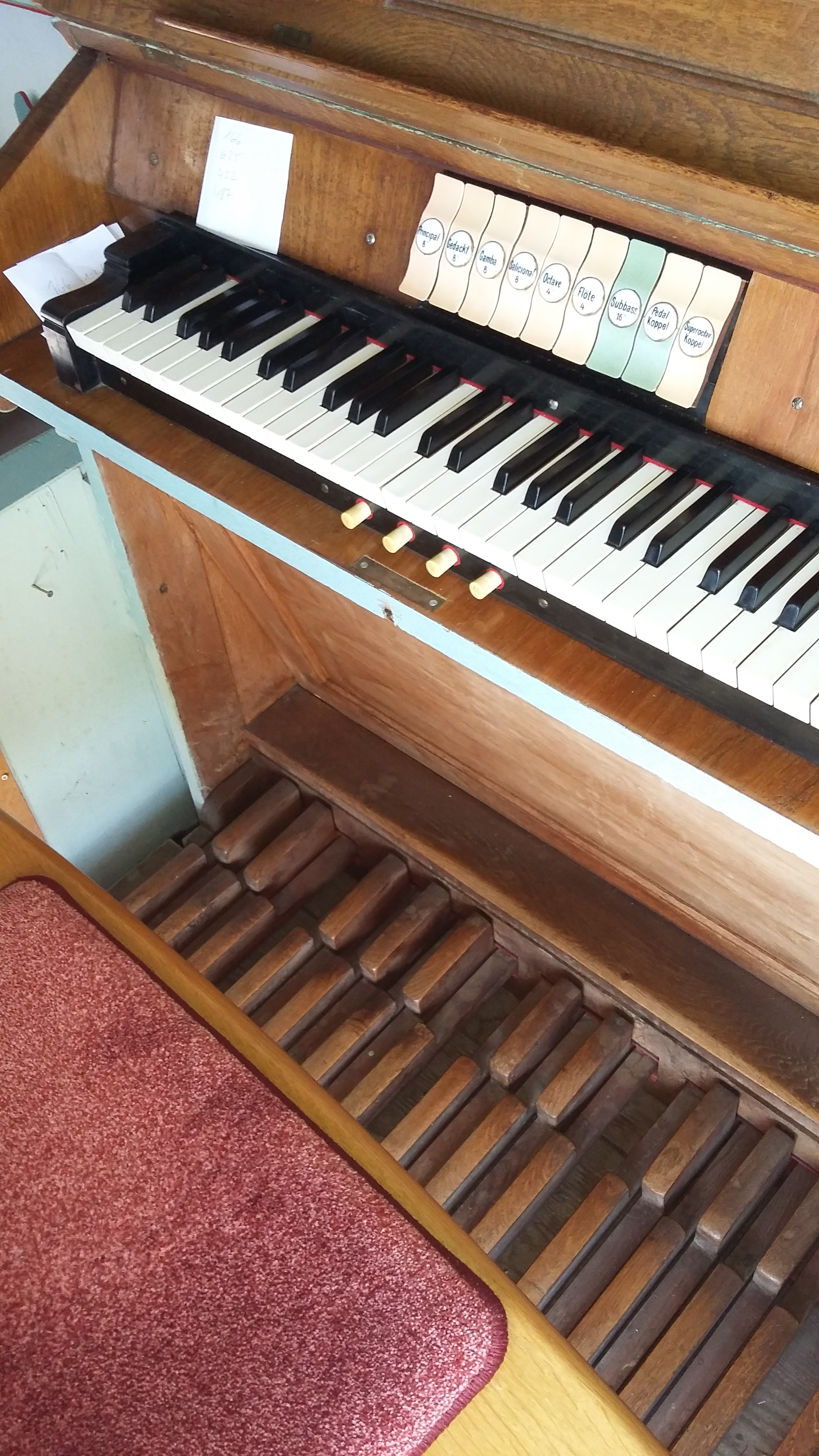 Horn-Orgel in Eppenrod (1906) - Spieltisch